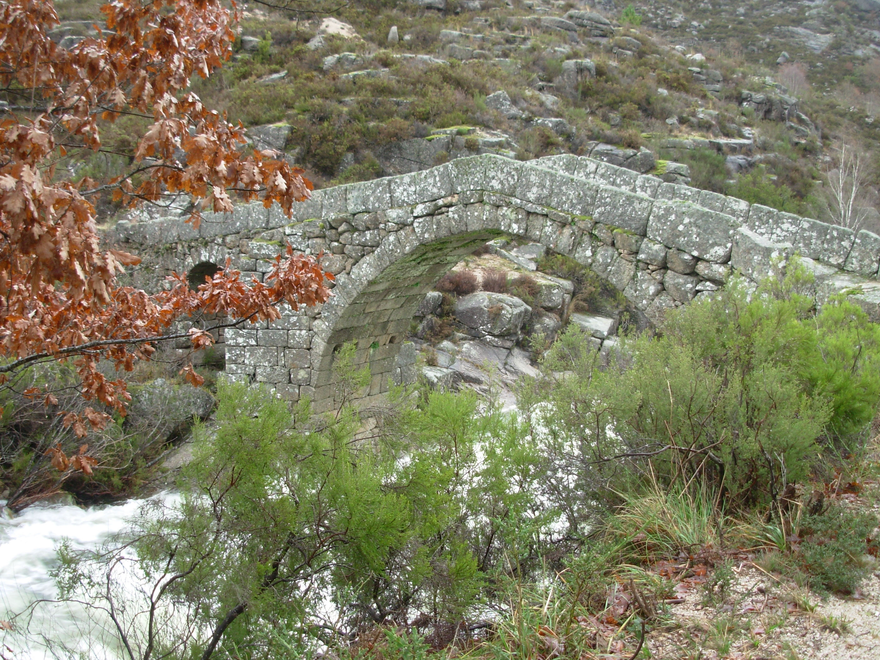 Rio Castro Laboreiro, Ponte Nova